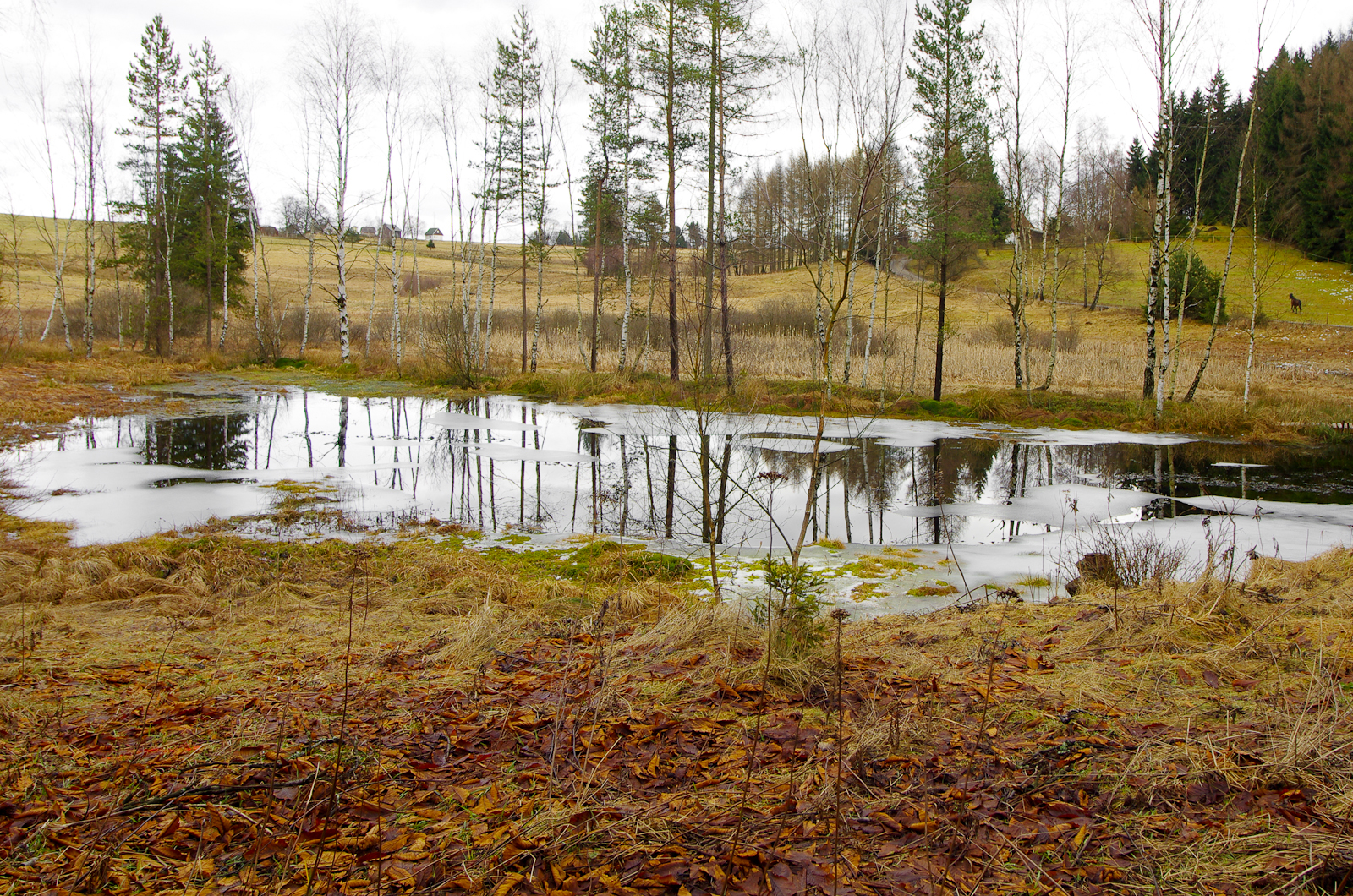 Přírodní památka Studenec, na okraji Horního Studence u Oloví, Krušné Hory, okres Sokolov